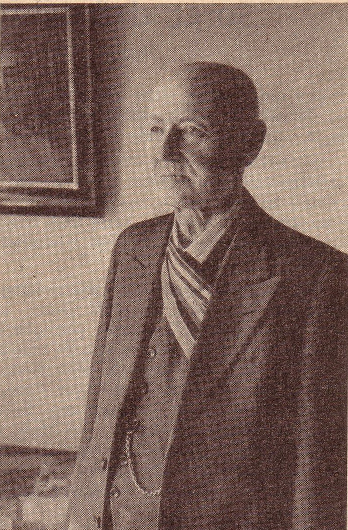 Fotografie von Prof. Dr. Felix Genzmer (1878-1959)